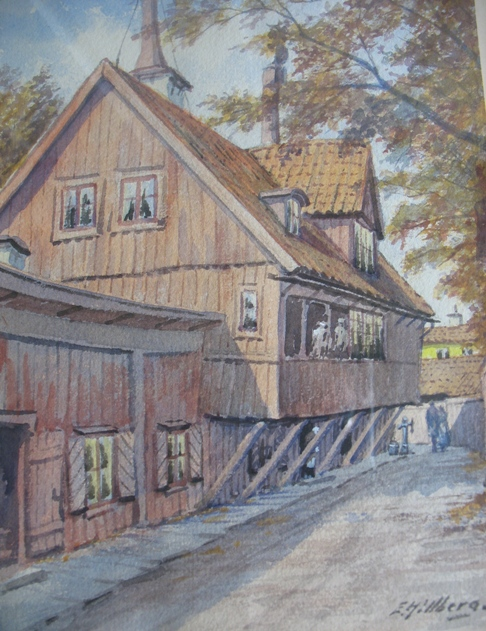 Akvarell av Einar Hillberg föreställande Bellmanshuset på Djurgården i Stockholm